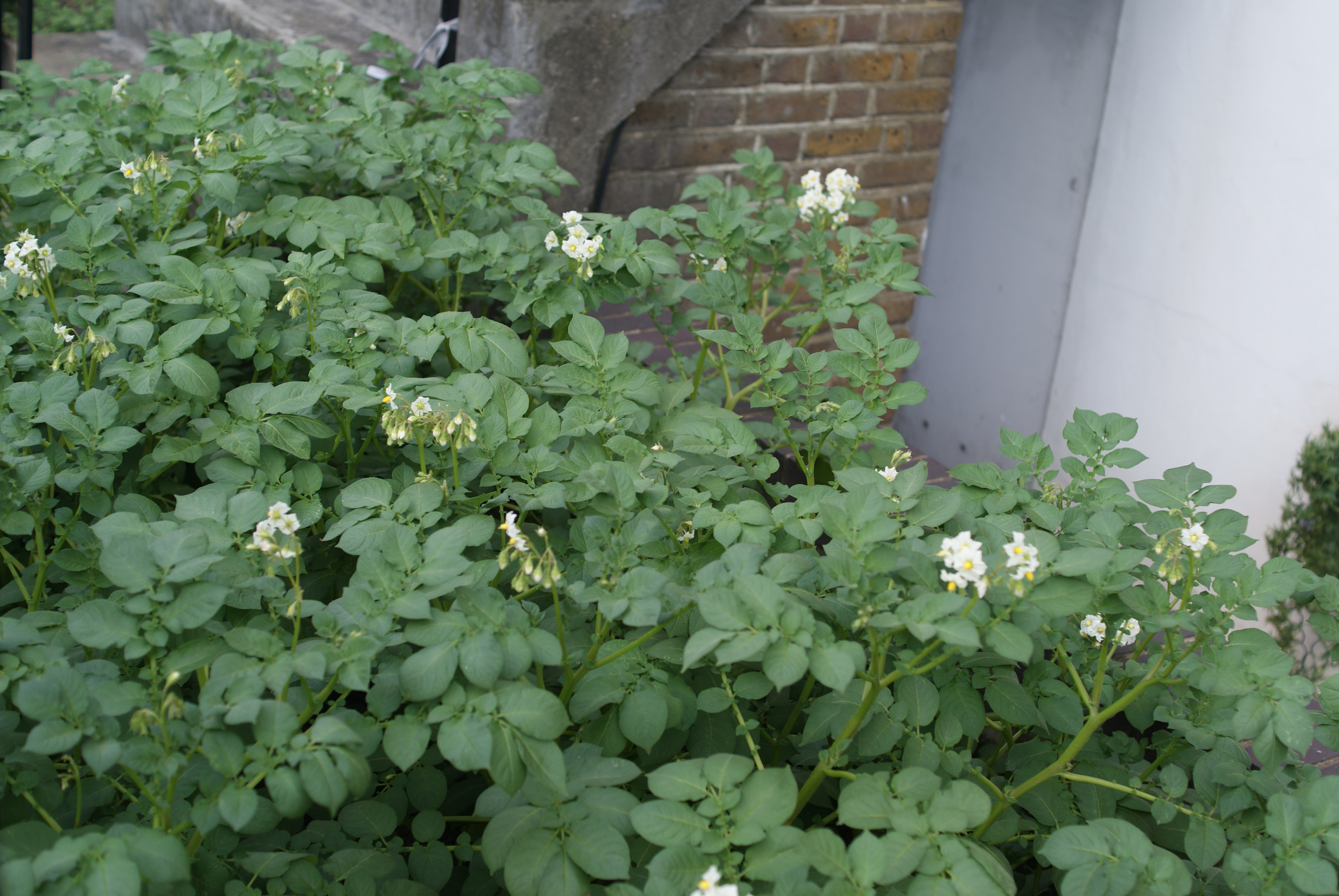 Флора ў Лондане (Potato)